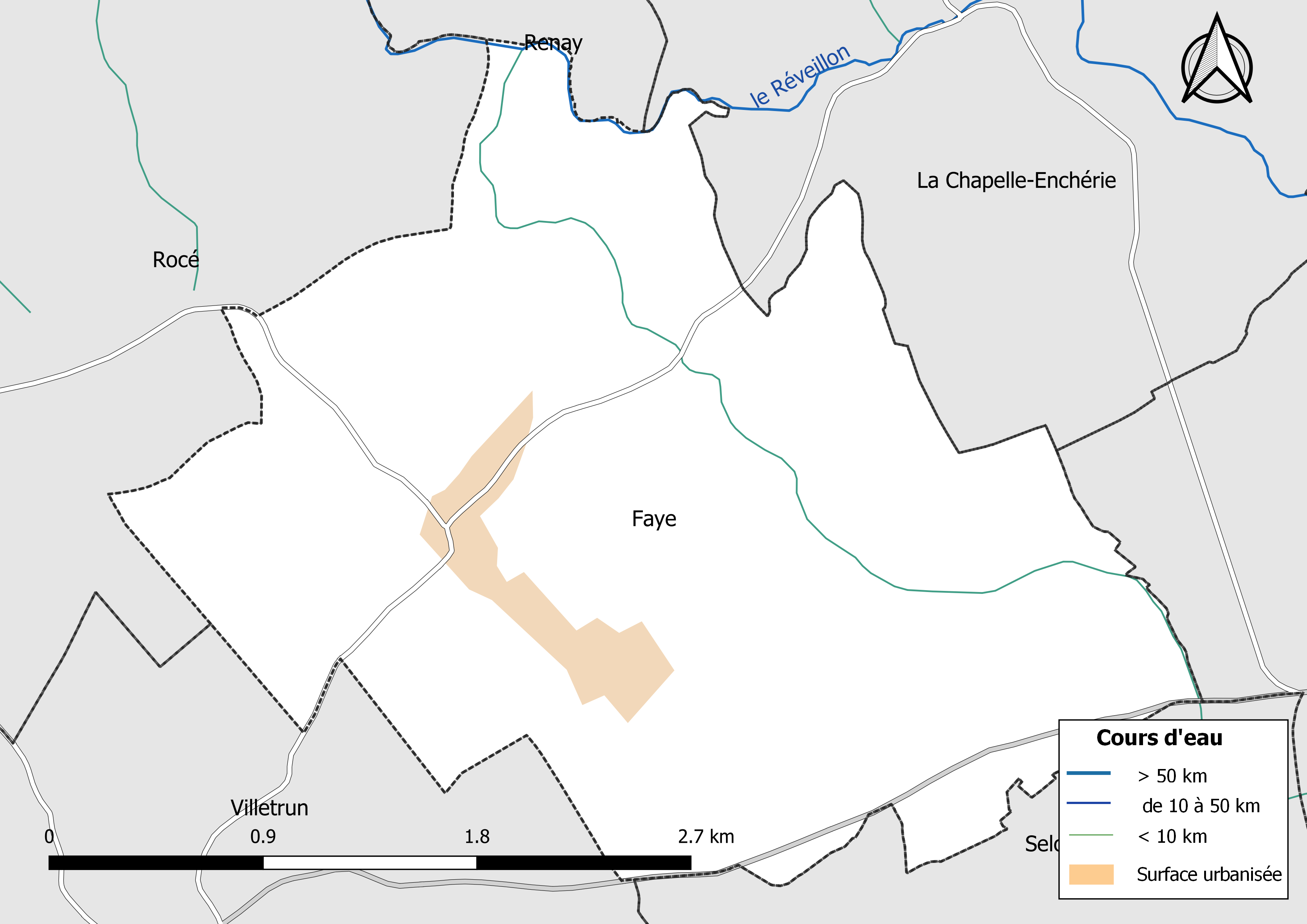 Carte du réseau hydrographique de la commune de Faye (Loir-et-Cher, France).